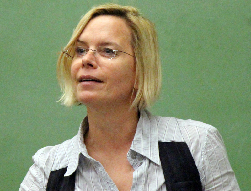 Dagmar Kaiser, Bild enthält Manipulationen (die Tafel wurde "geputzt")